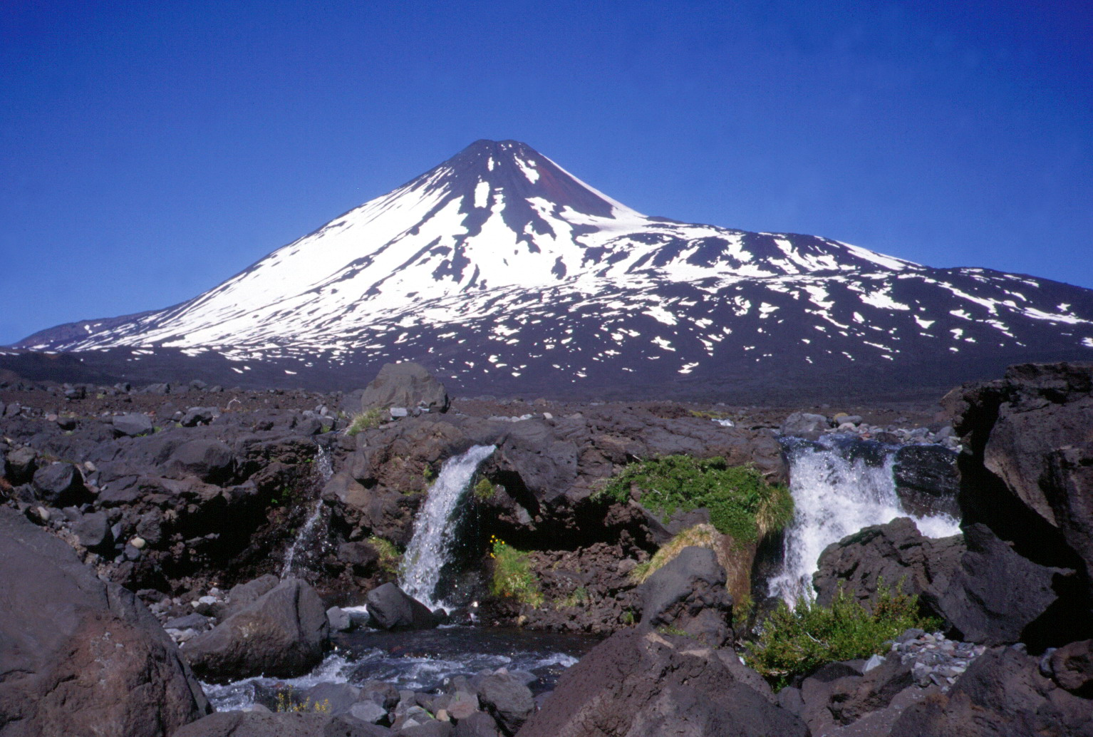 Antuco Volcano, Chile.Volcán Antuco